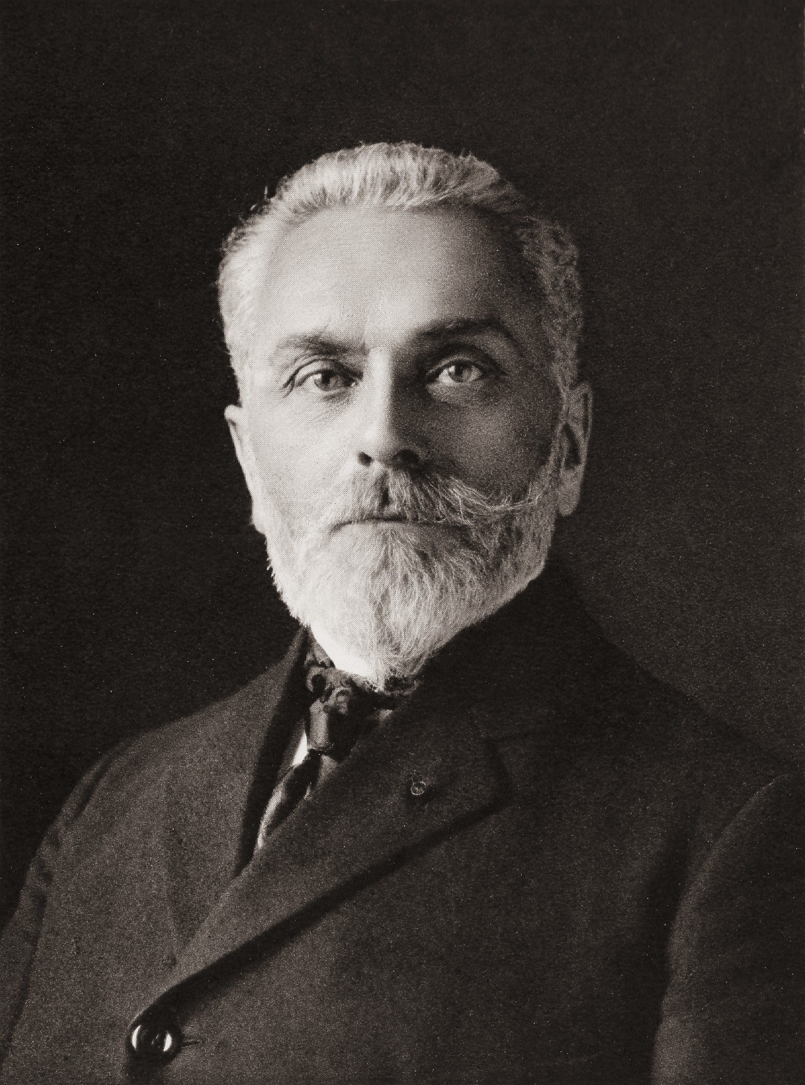 Portrait de Victor Bérard (1864-1931)